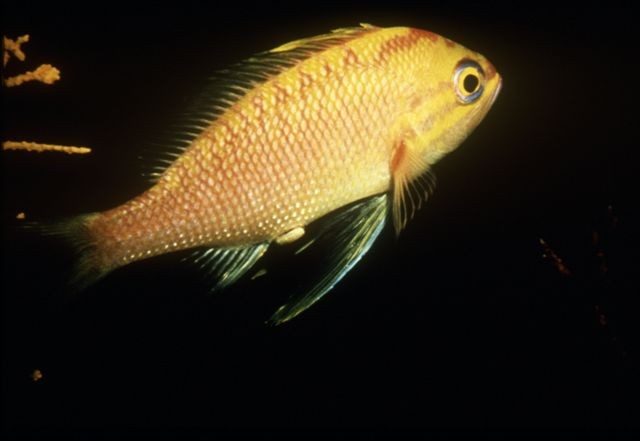 Area Marina Protetta Capo Gallo, Palermo, Sicily Anthias anthias